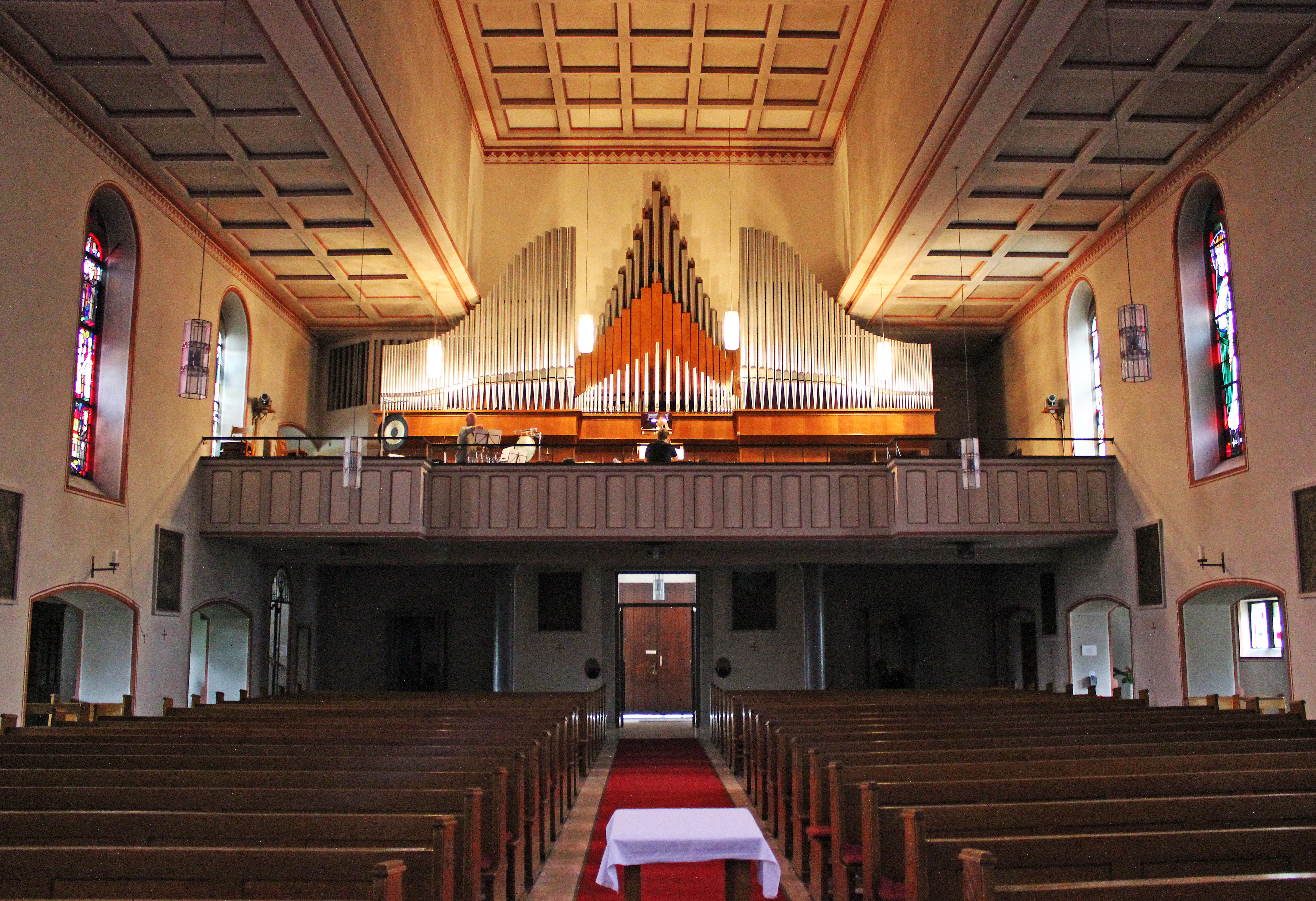 Blick ins Innere der katholischen Pfarrkirche St. Peter in Bous, Landkreis Saarlouis, Saarland